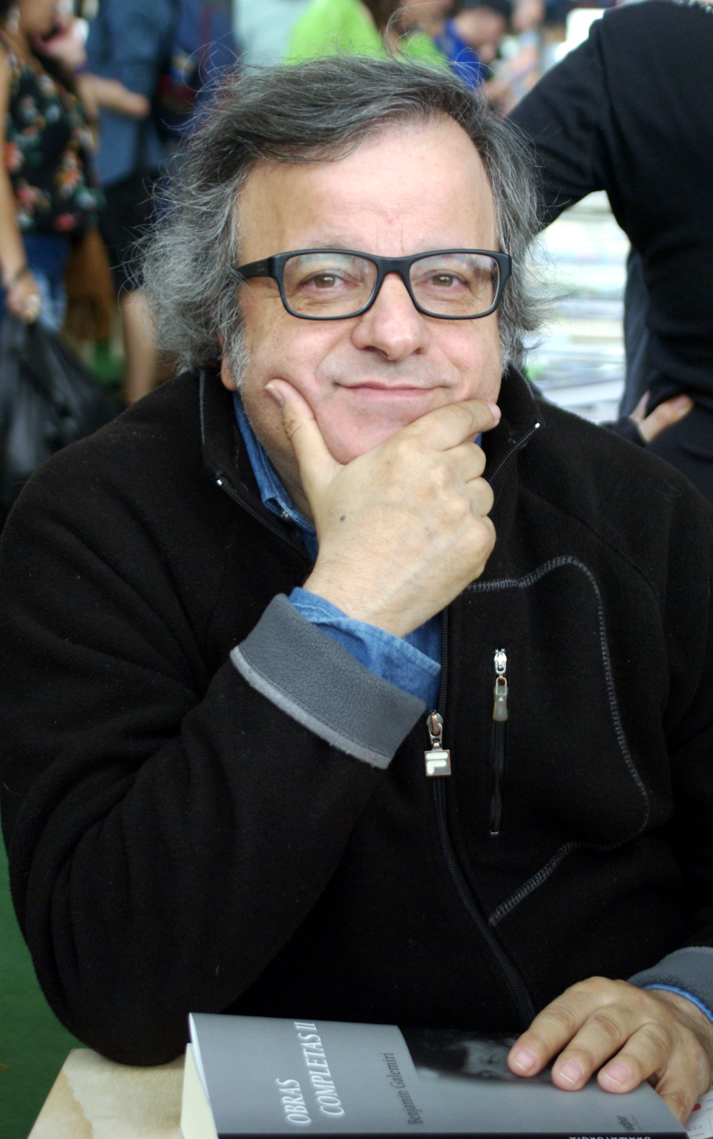 El dramaturgo chileno Benjamín Galemiri en la Feria Internacional del Libro de Santiago 2016